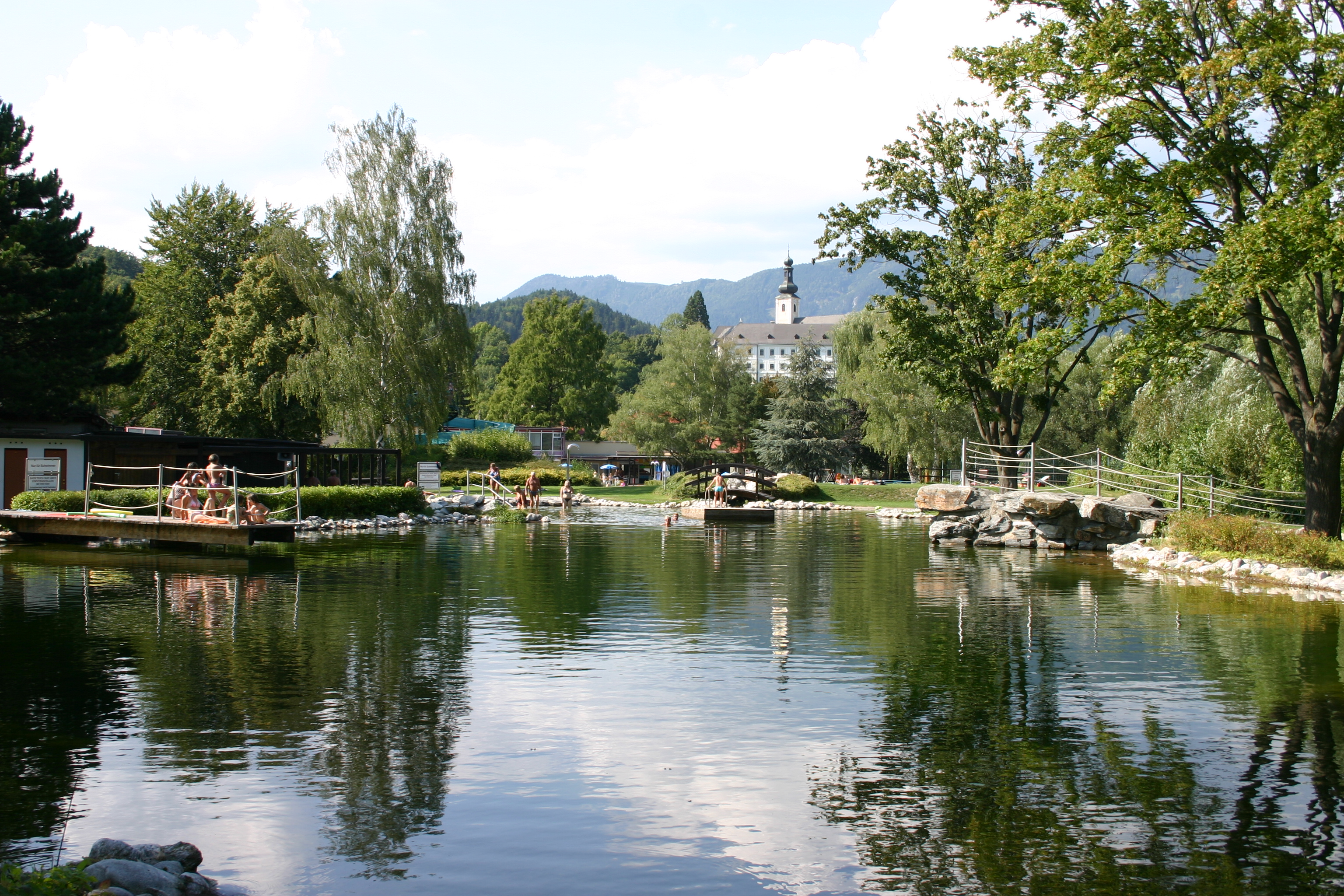 Gloggnitz, Naturbad (Bild 1)